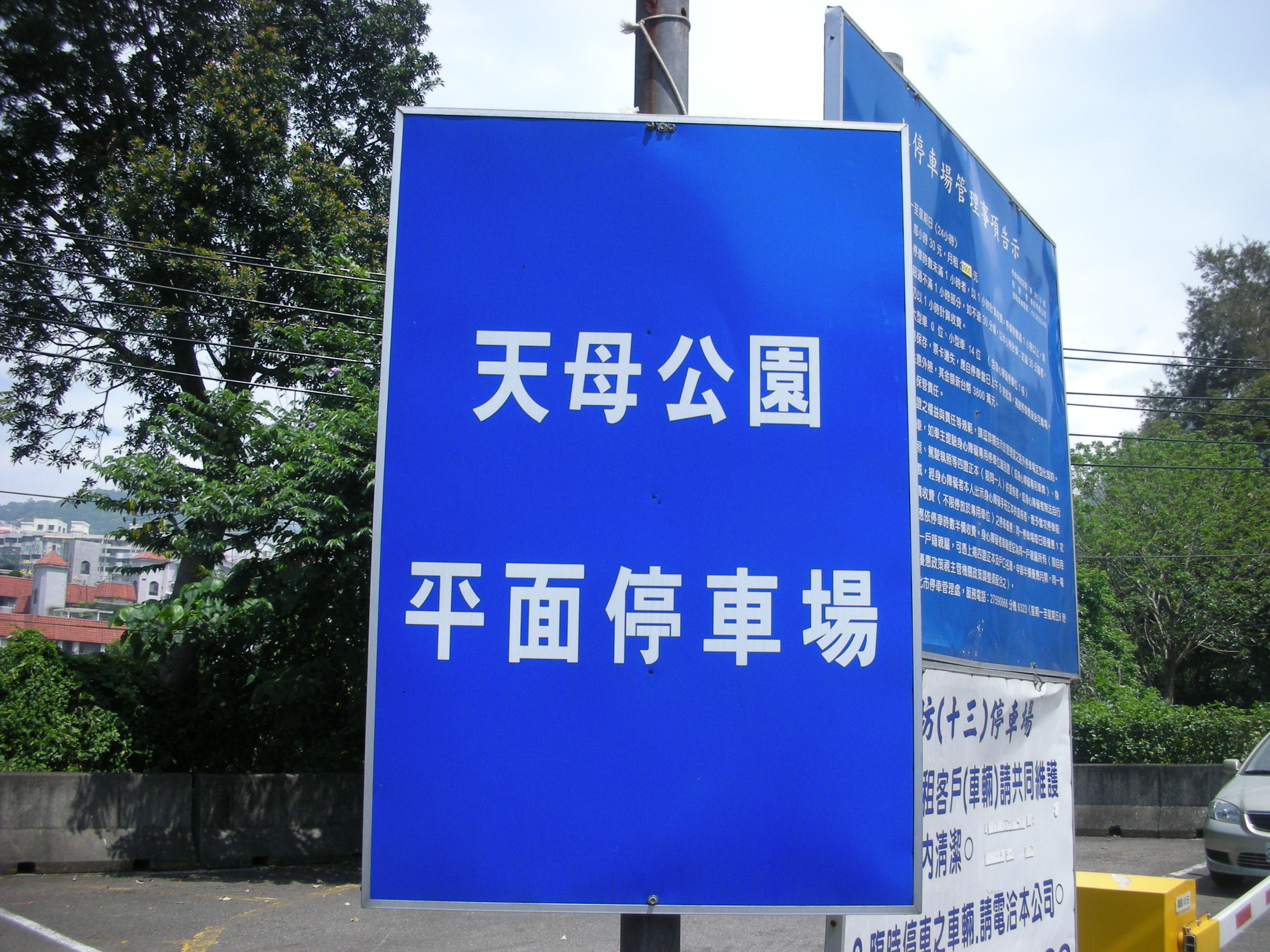 行義路至陽明山健步走